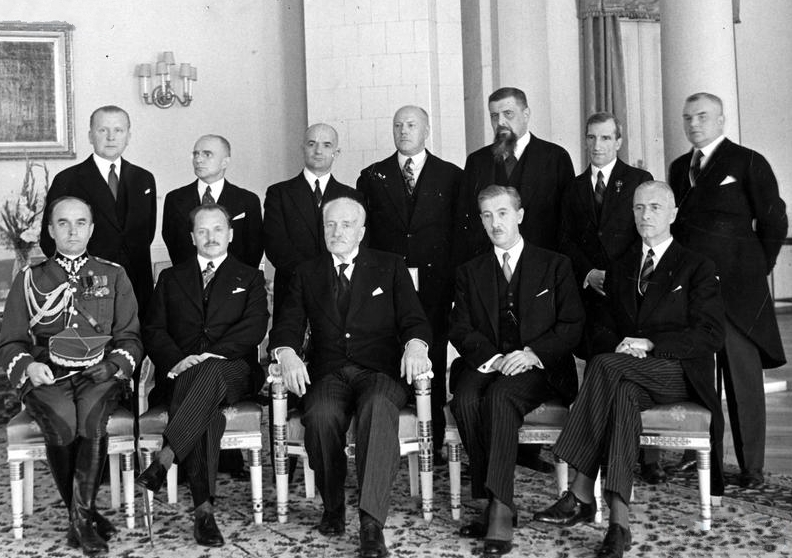 Polish Government under Prime Minister Marian Zyndram-Kościałkowski 1935